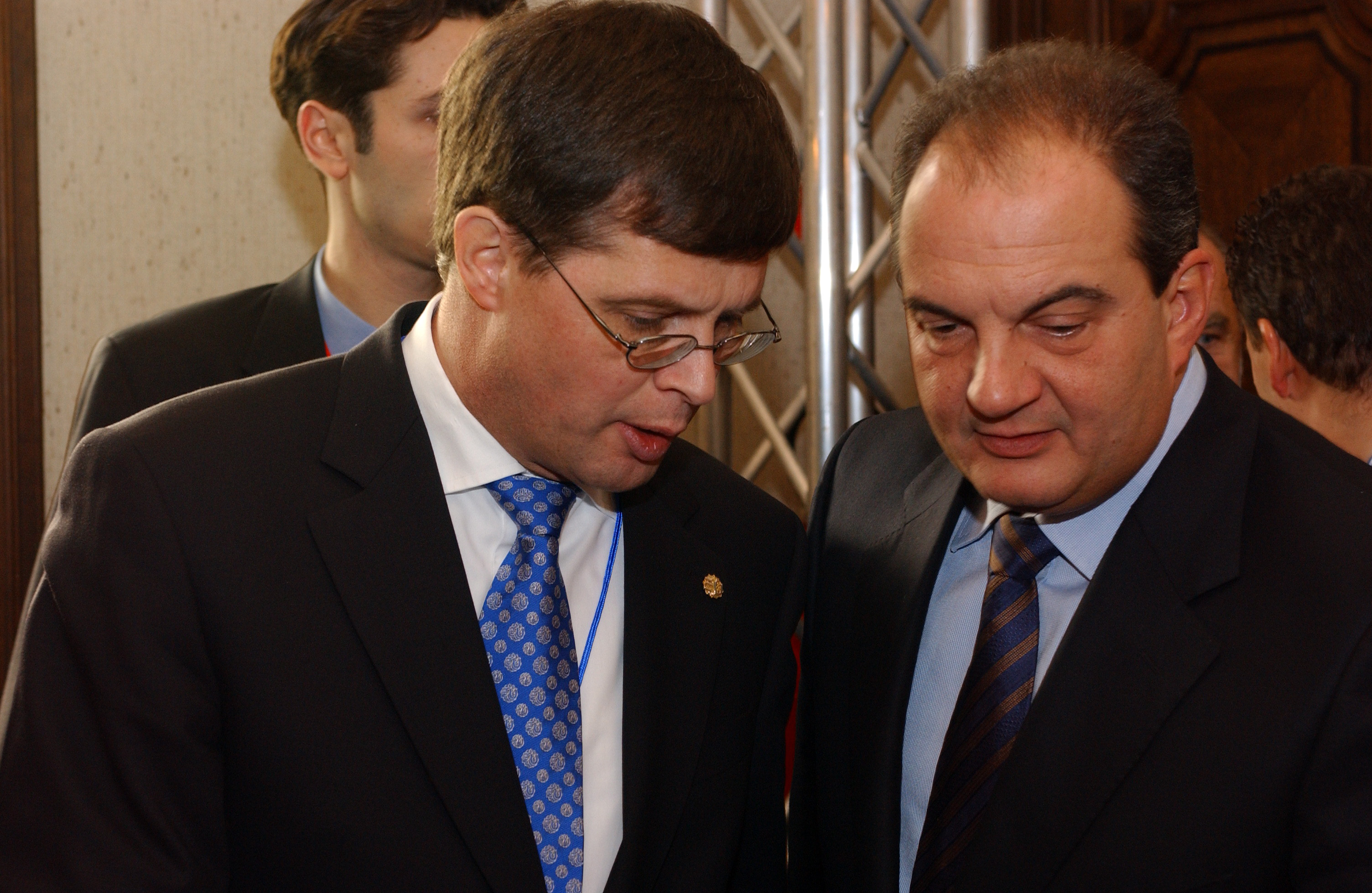 EPP Summit Meise 16 December 2004